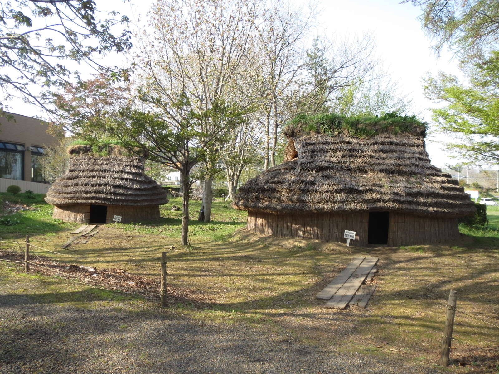 是川遺跡復元施設